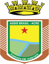 brasão de Assis Brasil-AC